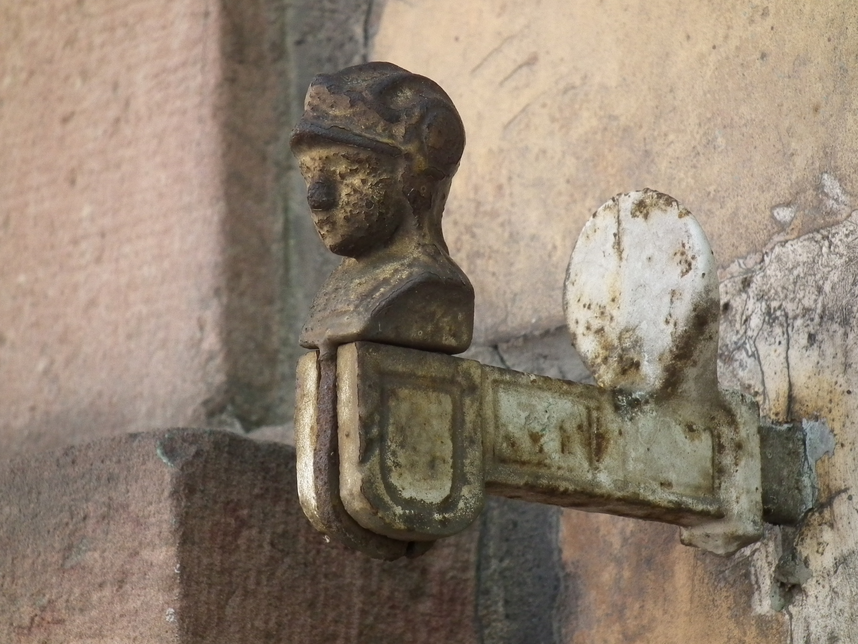 Verwitterte Vorrichtung, um einen Fensterladen zu fixieren, fotografiert in Wiesloch (Baden-Württemberg, Deutschland)